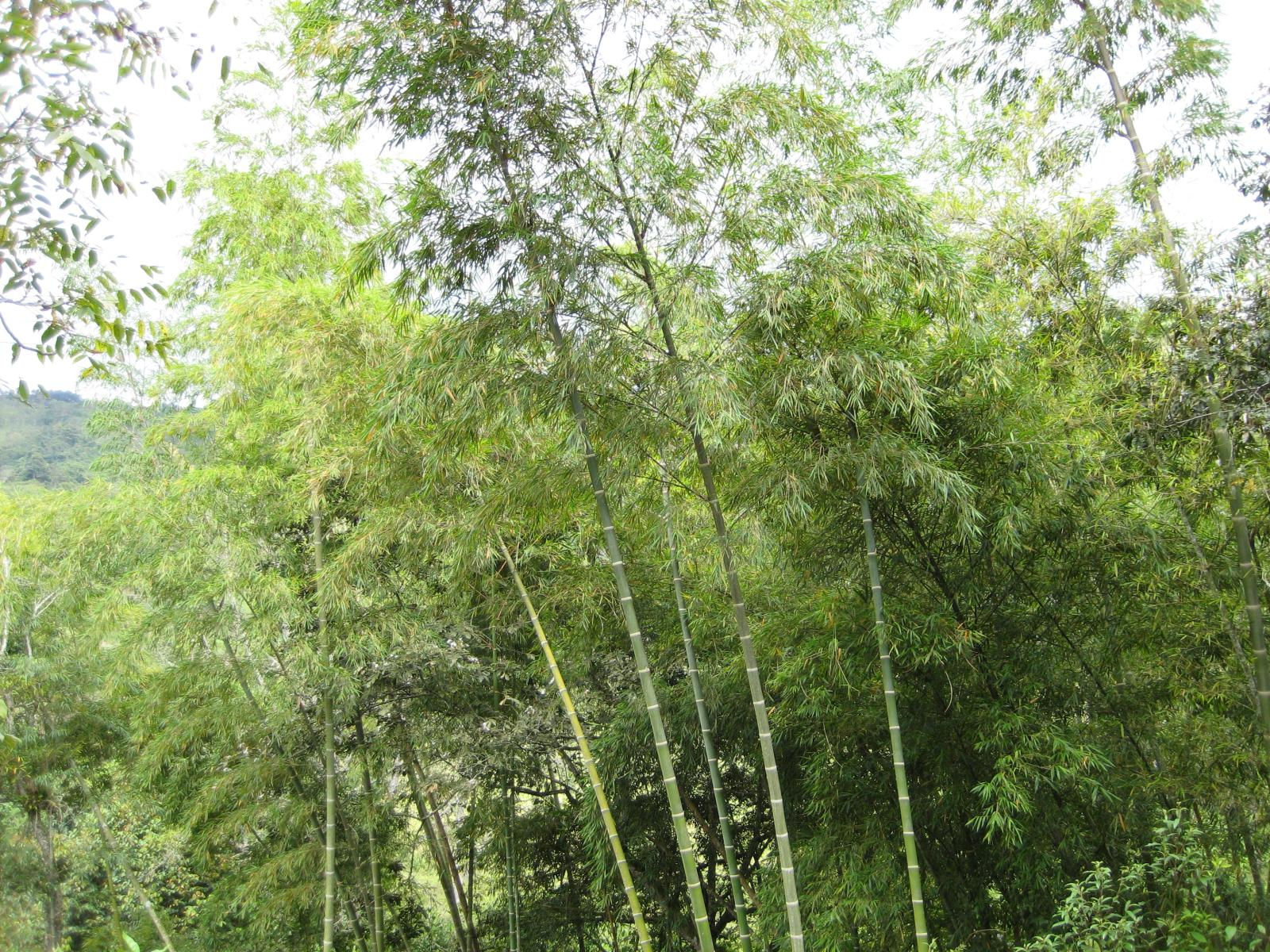 Guadua Bambus in Colombia